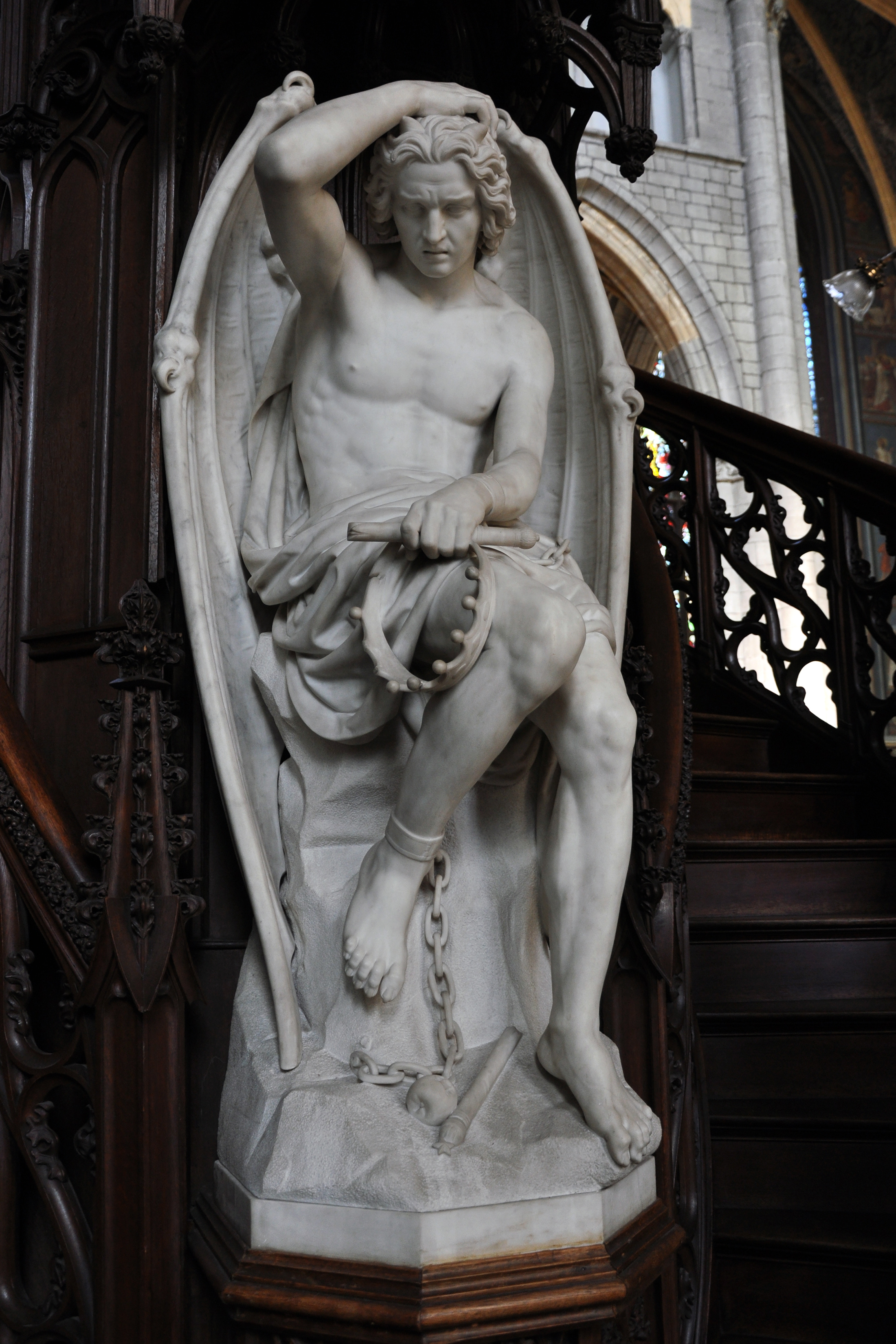 Cathédrale Saint-Paul de Liège; la chaire, par Guillaume Geefs, de style néo-gothique, datant du milieu du 19ème siècle. Détail: Lucifer, au revers de la chaire.